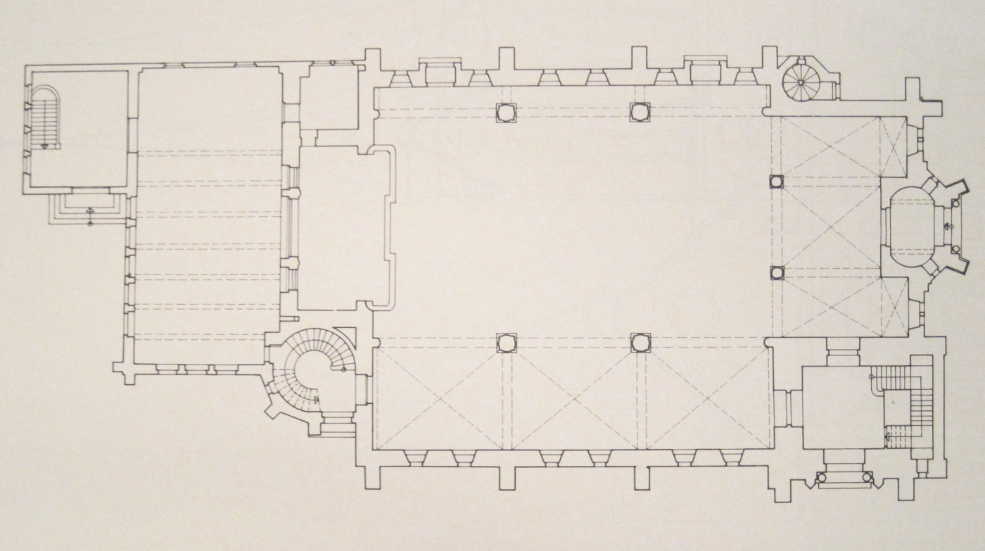 Friedenskirche in Mannheim-Schwetzingerstadt